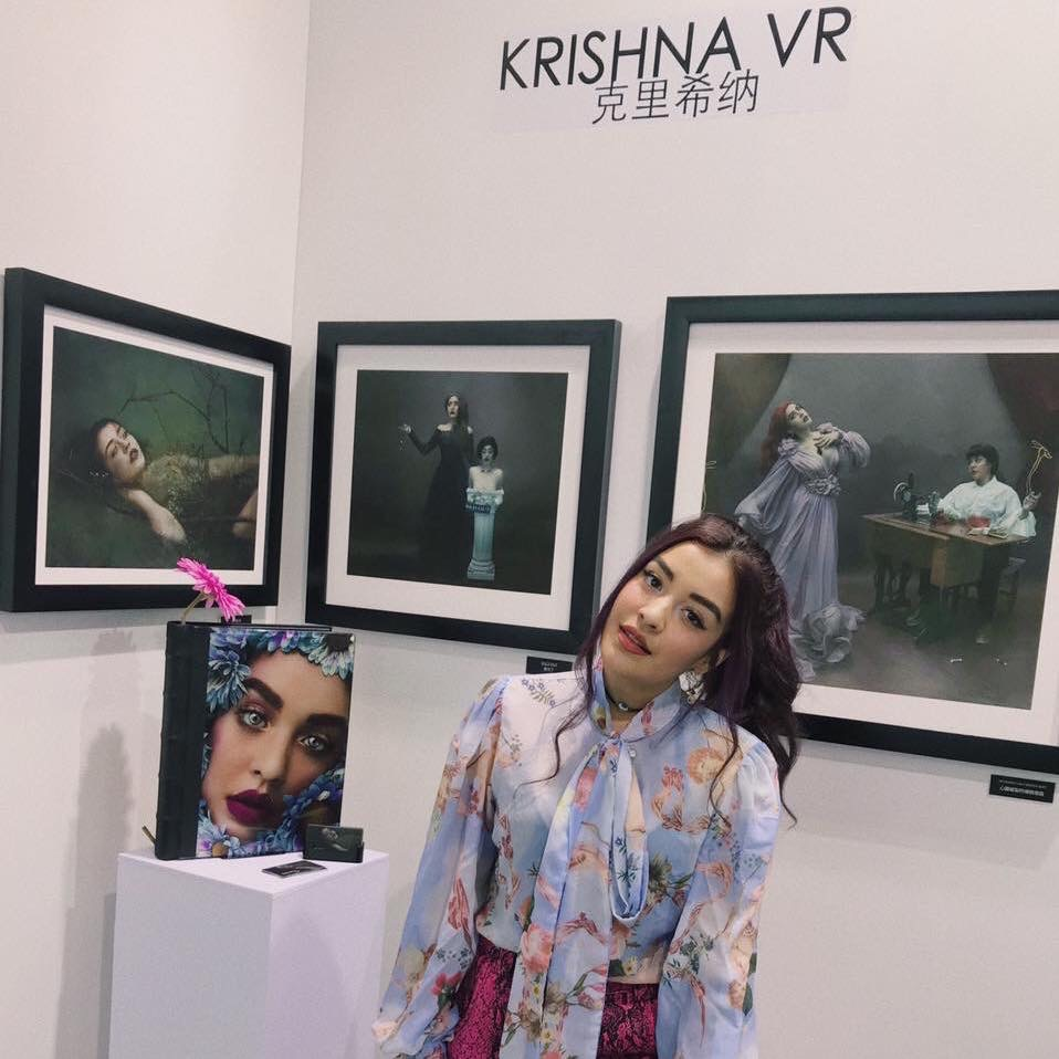 Kirshna VR en 2019